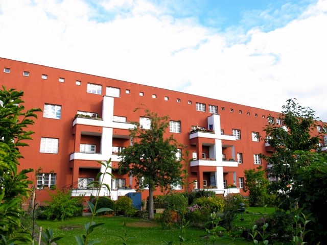 Hus kallat "Rote Front" i bostadsområdet Hufeisensiedlung i Berlin-Neukölln (Britz)